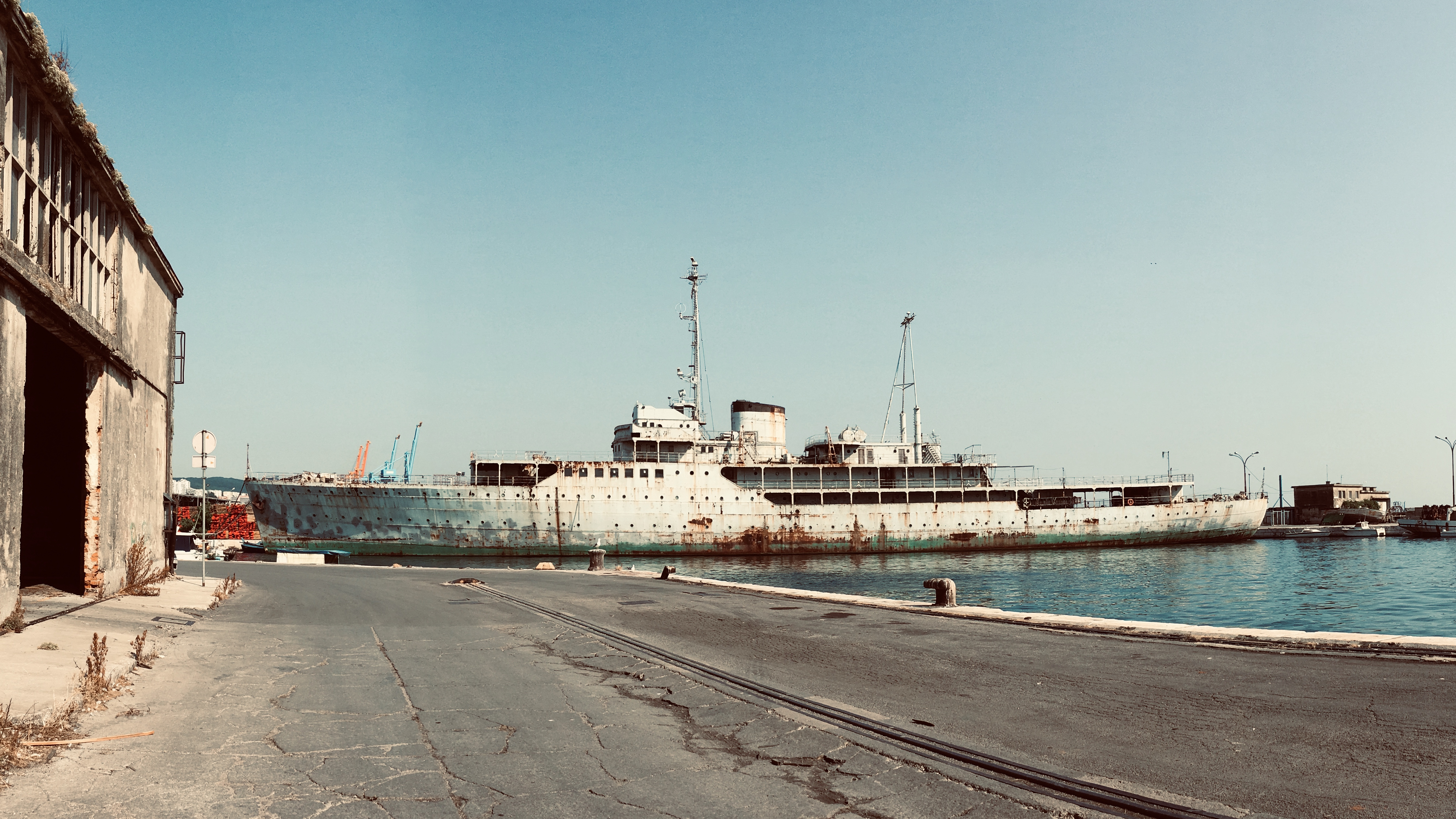 Das Geisterschiff "Galeb" im Hafen von Rijeka im Juni 2019.